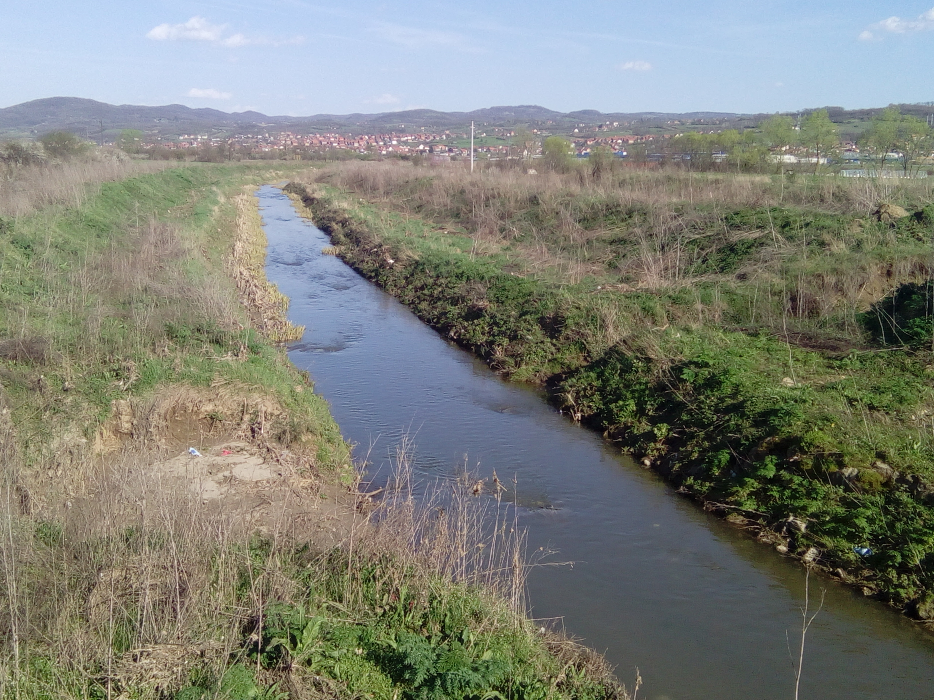 Srpski (latinica): Reka Uglješnica u Jovanovcu